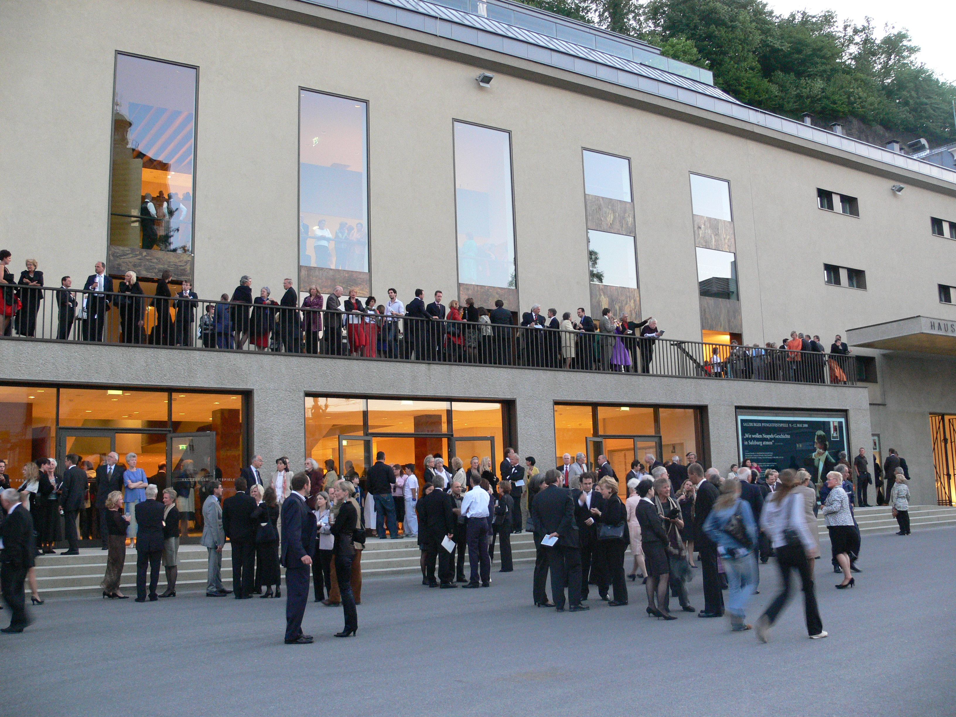 Salzburg, Festspielhauskomplex, Haus für Mozart (Kleines Festspielhaus)